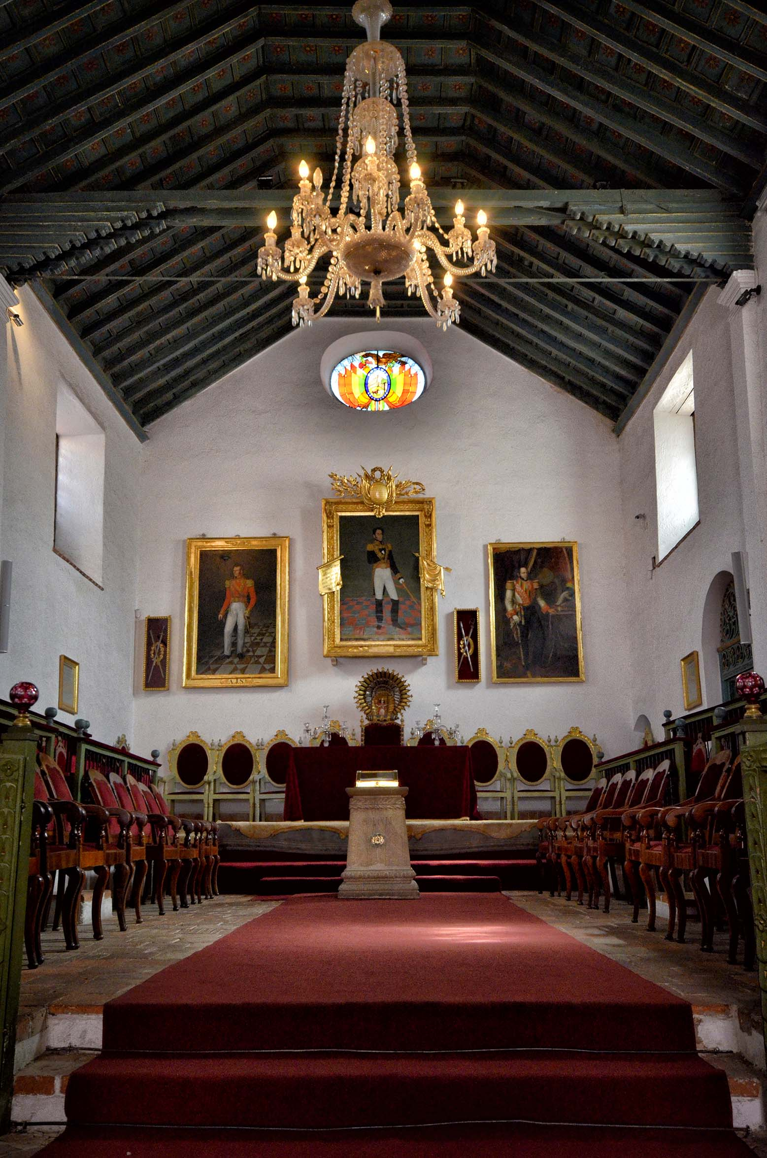 Casa de la Libertad This medium shows the protected monument with the number H/00-019 in Bolivia.